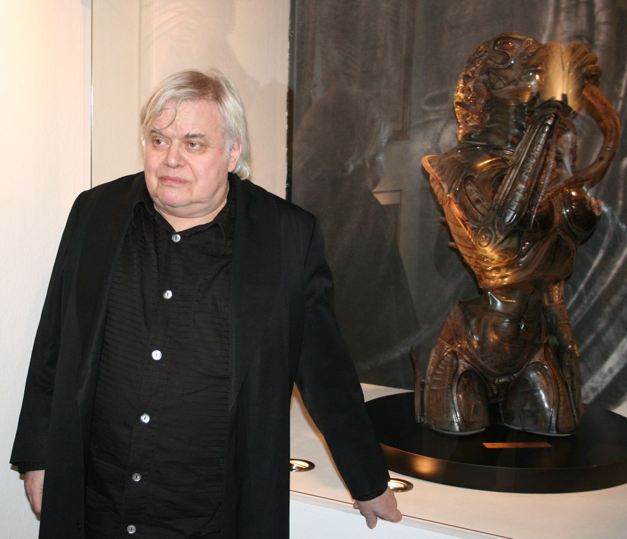 H.R. Giger neben der Büste "Sil" aus dem Science-Fiction-Film Species im Deutschen Filmmuseum in Frankfurt/Main